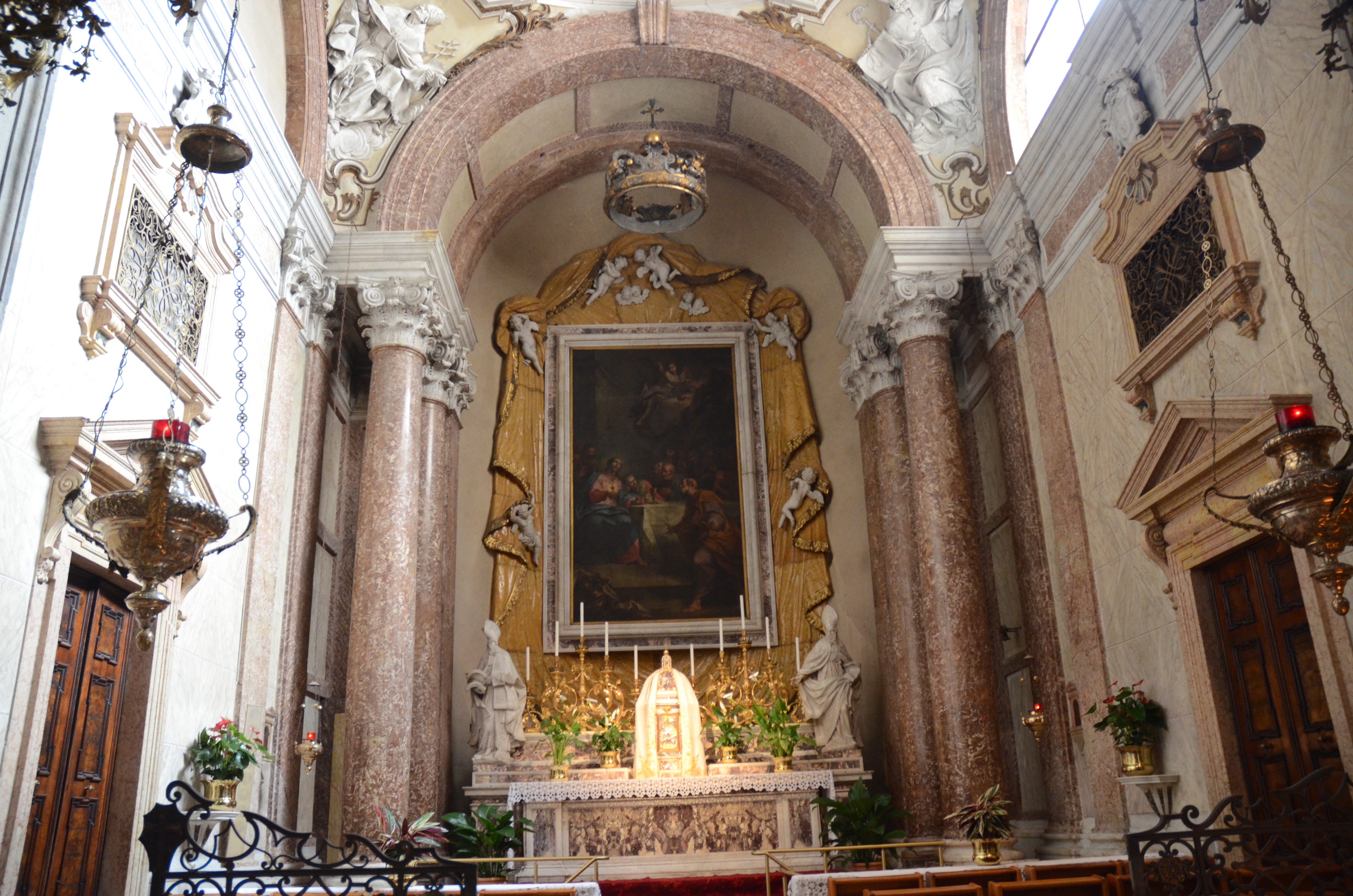 Scorcio della cappella minore